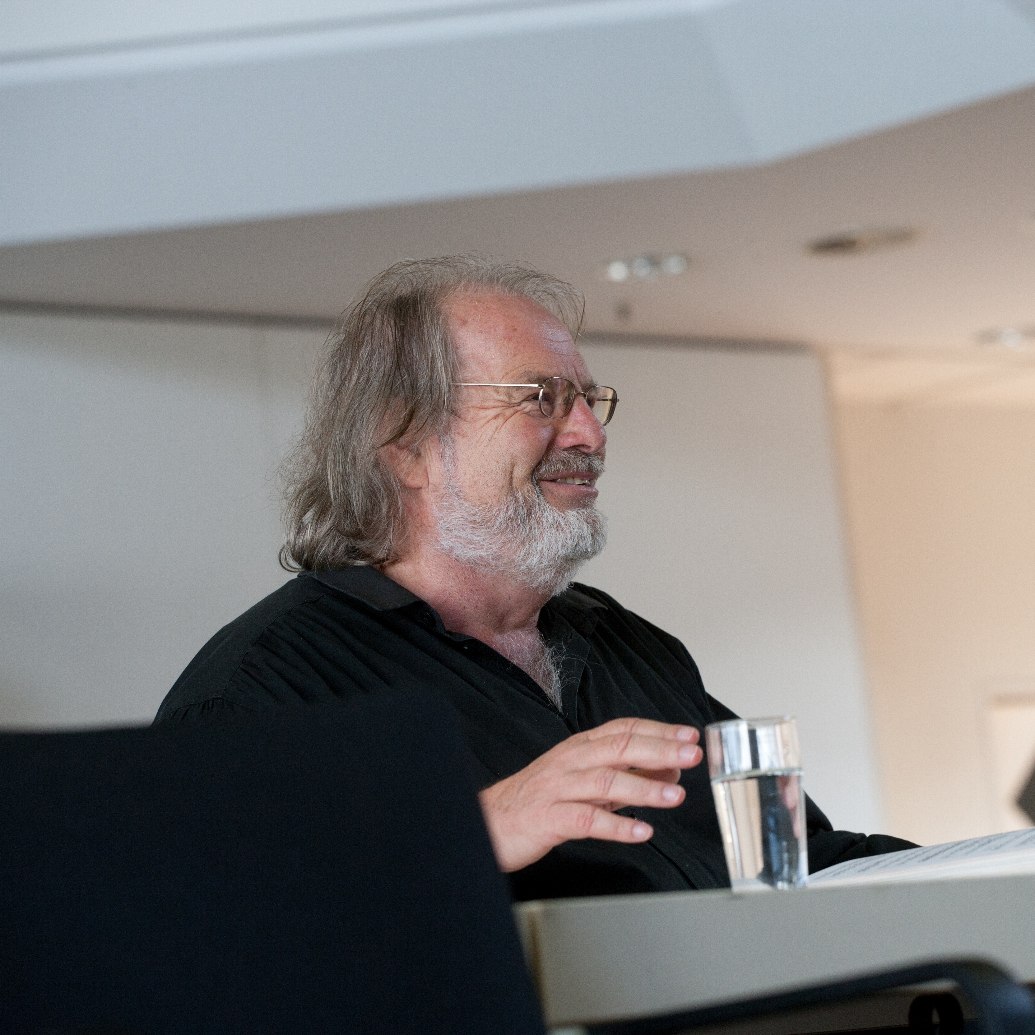 Gustav Kuhn in seiner Master Class am 23.10.2012 in der Stadthalle Gütersloh Foto: Thomas Kunsch